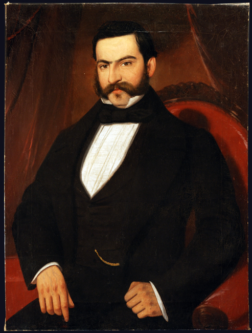 Francisco cortes de monroy pintado por el pintor frances Raymond Monvoisin